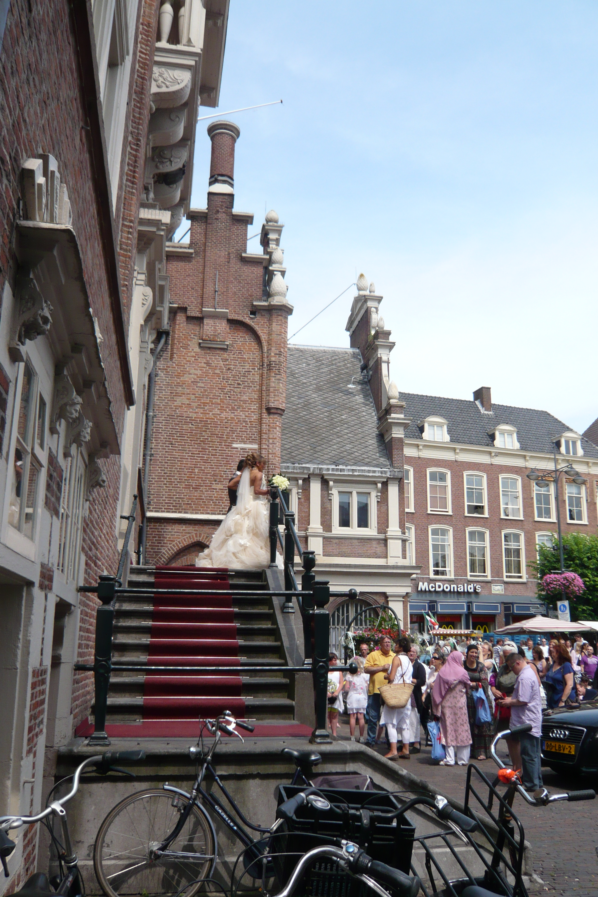 pas getrouwde echtpaar op het bordes van het Haarlems Stadhuis.